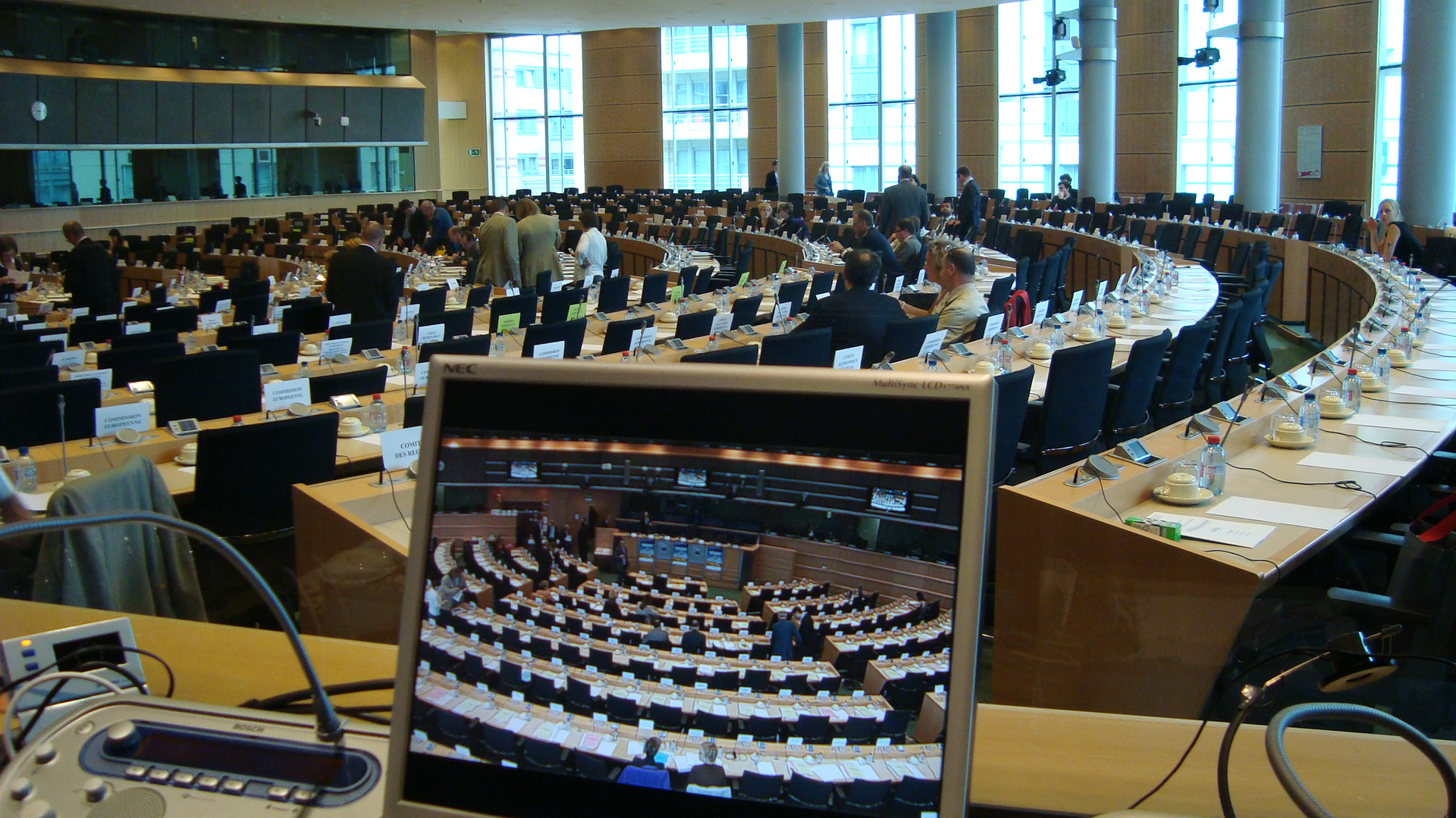 Salle de réunion au Parlement européen, Bruxelles, vue de la cabine d'interprétation